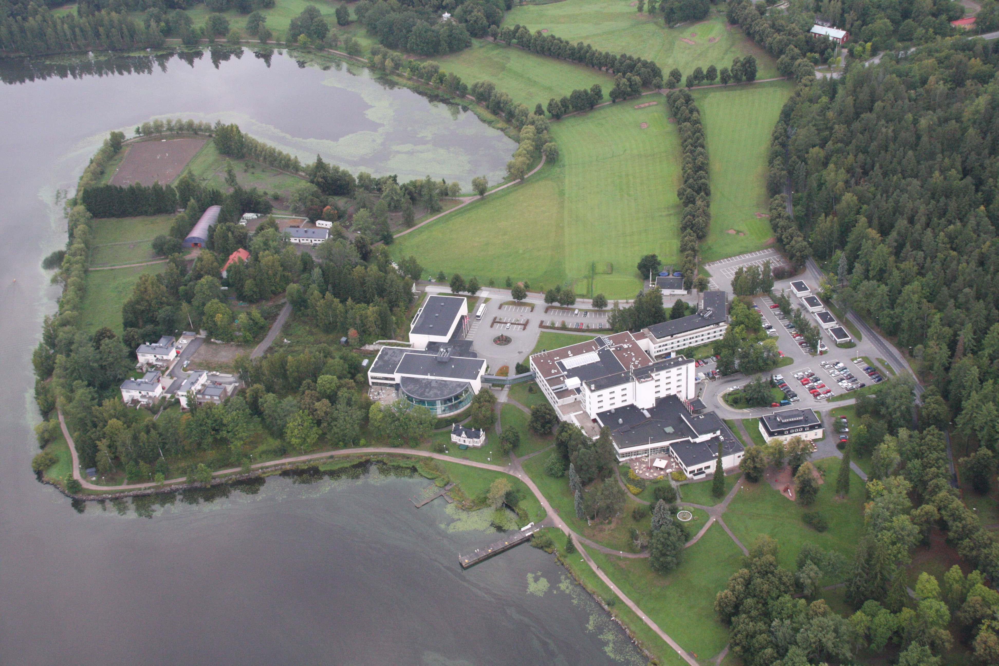 Hotelli Aulangon aluetta kuumailmapallosta kuvattuna